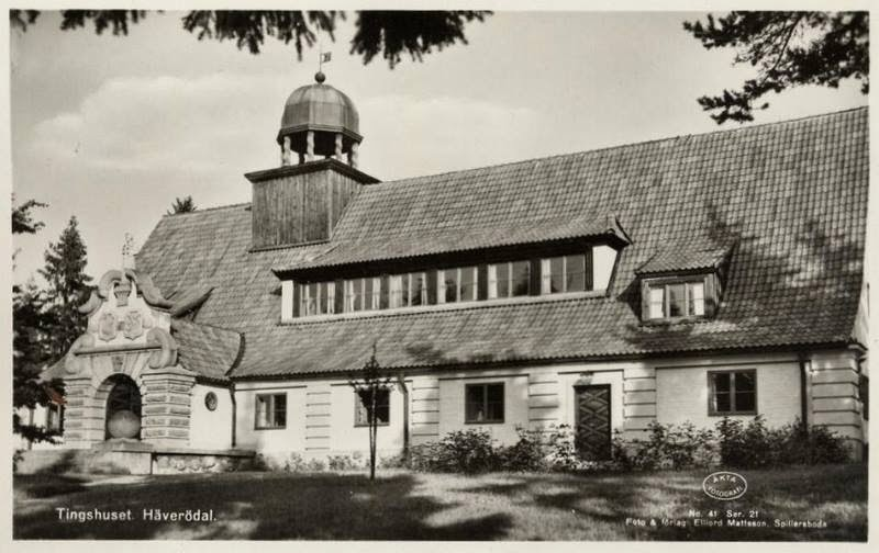 Häverödals tingshus. Byggnaden uppfördes 1923 - 1924 som tingshus för Norra Roslags domsaga (Väddö och Häverö skeppslag och Närdinghundra härad). Arvid Huss (Arkitekt) Norra Roslags domsagas tingshusbyggnadsskyldige (Byggherre)